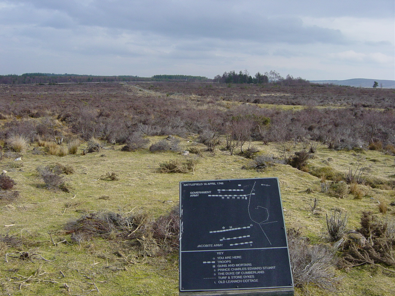 Vista del campo de batalla de Culloden desde las líneas iniciales jacobitas; en el cartel puede apreciarse la distribución de las fuerzas. Overlooking Culloden Battlefield, from behind Jacobite line. I took this photograph in March, 2004.